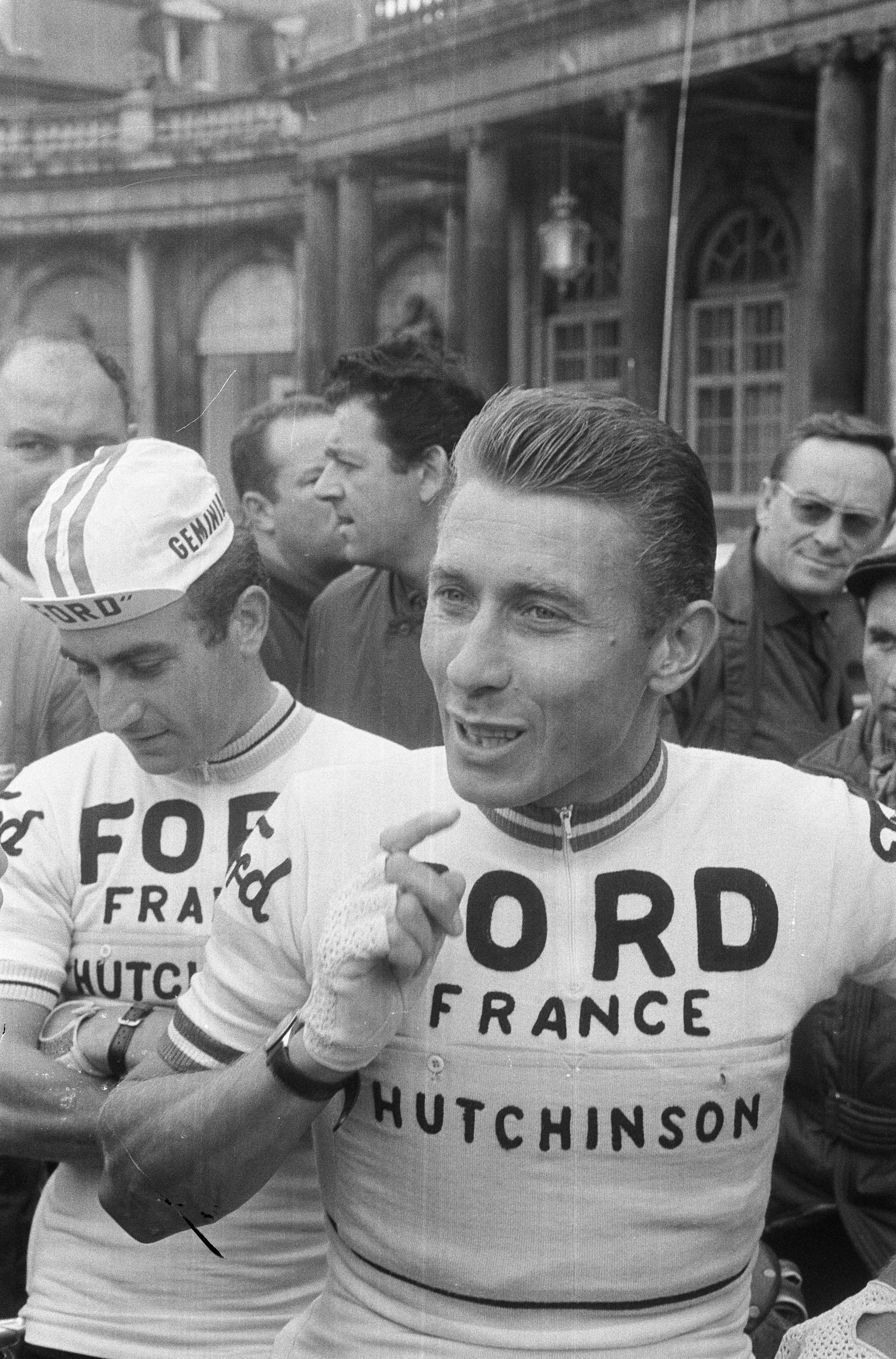 Collectie / Archief : Fotocollectie Anefo Reportage / Serie : [ onbekend ] Beschrijving : Tour de France , Jacques Anquetil Datum : 27 juni 1966 Persoonsnaam : Jacques Anquetil Instellingsnaam : Tour de France Fotograaf : Koch, Eric / Anefo Auteursrechthebbende : Nationaal Archief Materiaalsoort : Negatief (zwart/wit) Nummer archiefinventaris : bekijk toegang 2.24.01.05 Bestanddeelnummer : 919-2983